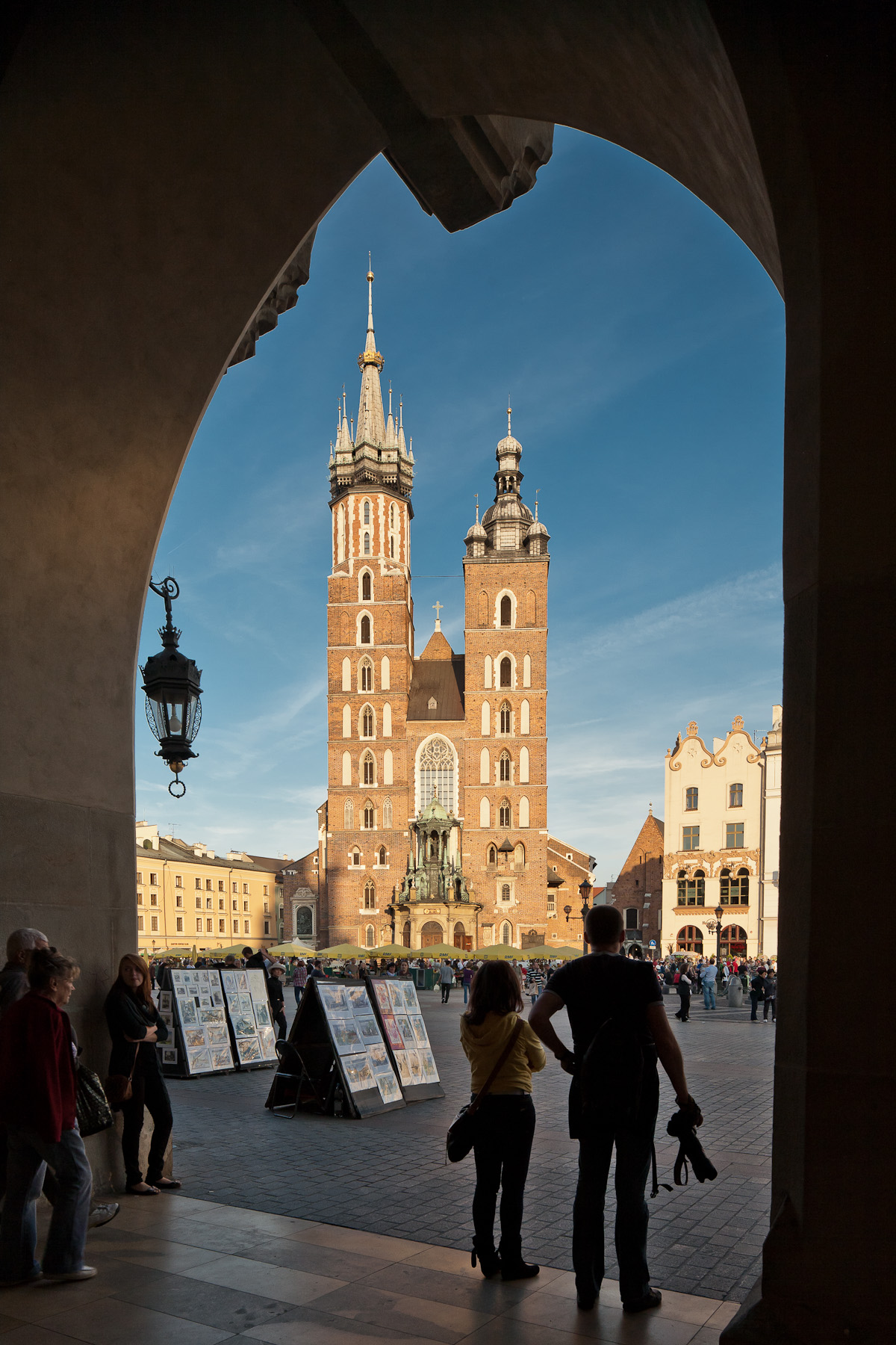 Kraków, kościół parafialny p.w. Wniebowzięcia NMP (Mariacki)